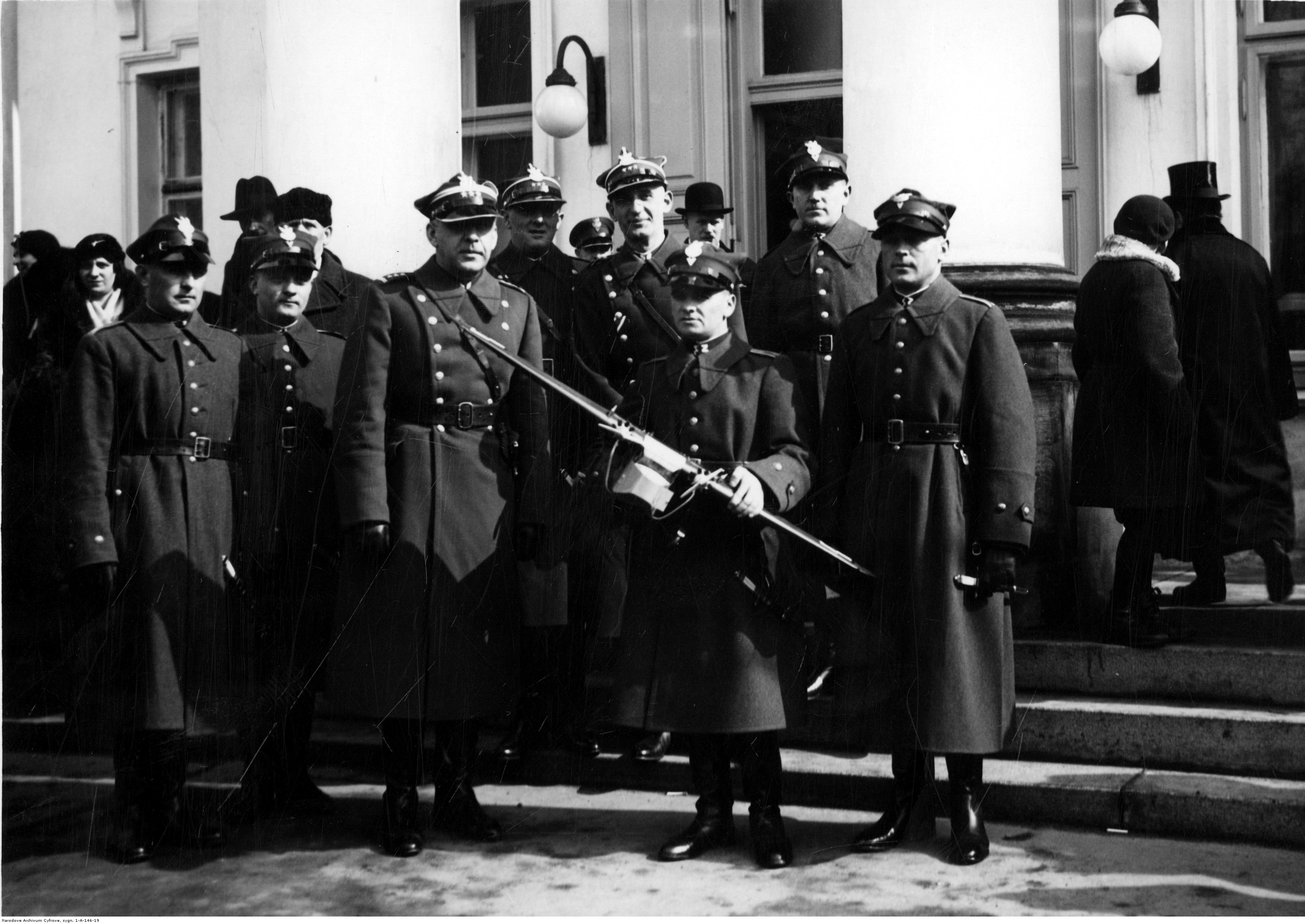 Uroczystości imieninowe Józefa Piłsudskiego w 1935 r. w Warszawie. Delegacja 1 pułku lotniczego z płk. Władysławem Kalkusem (3. z lewej, na pierwszym planie) na dziedzińcu Belwederu. Koncern Ilustrowany Kurier Codzienny - Archiwum Ilustracji. Sygnatura: 1-A-146-19